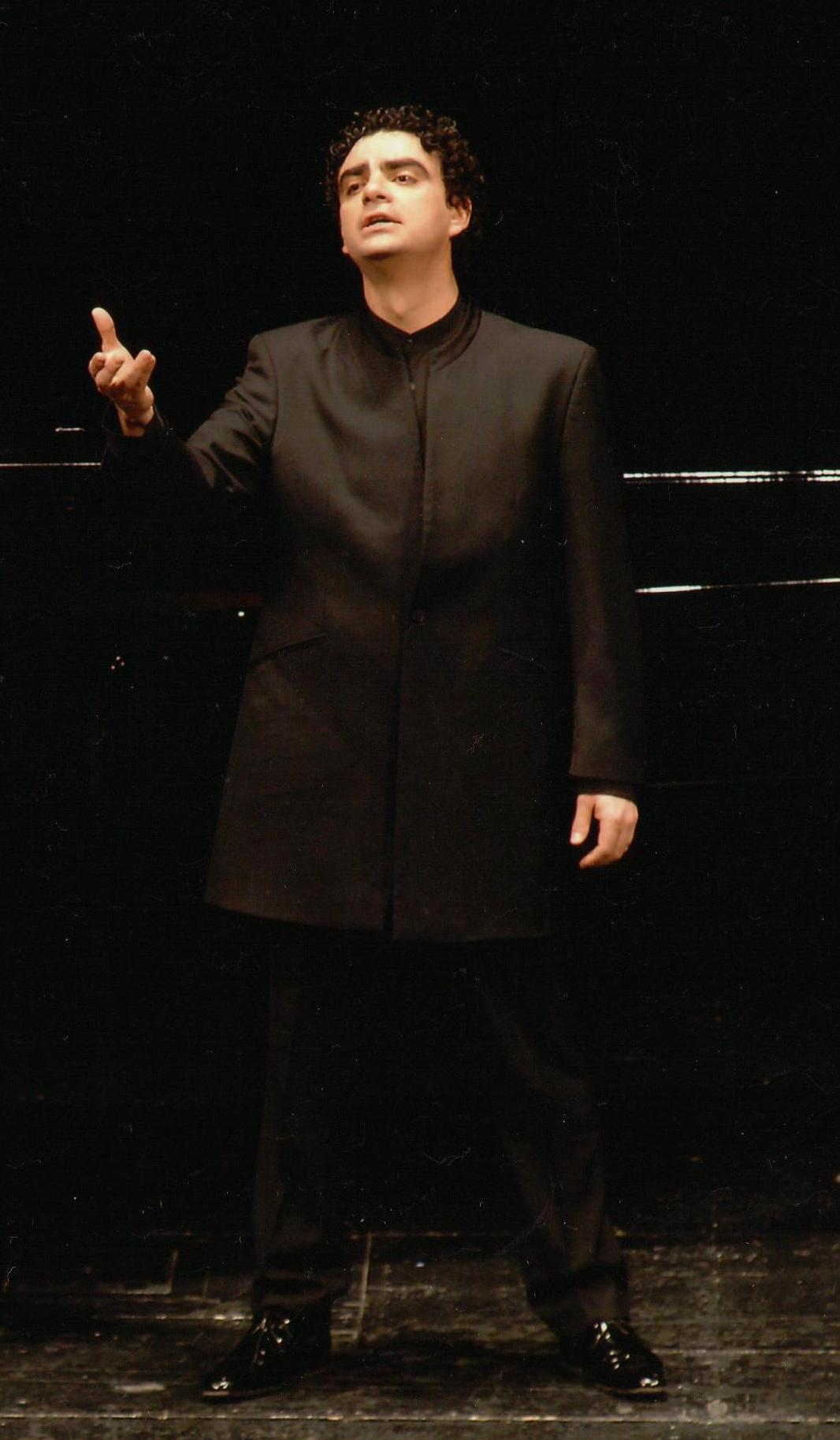 Ángel Rodríguez acompañando al piano al tenor mexicano Rolando Villazón en un recital en el Teatro Real de Madrid.